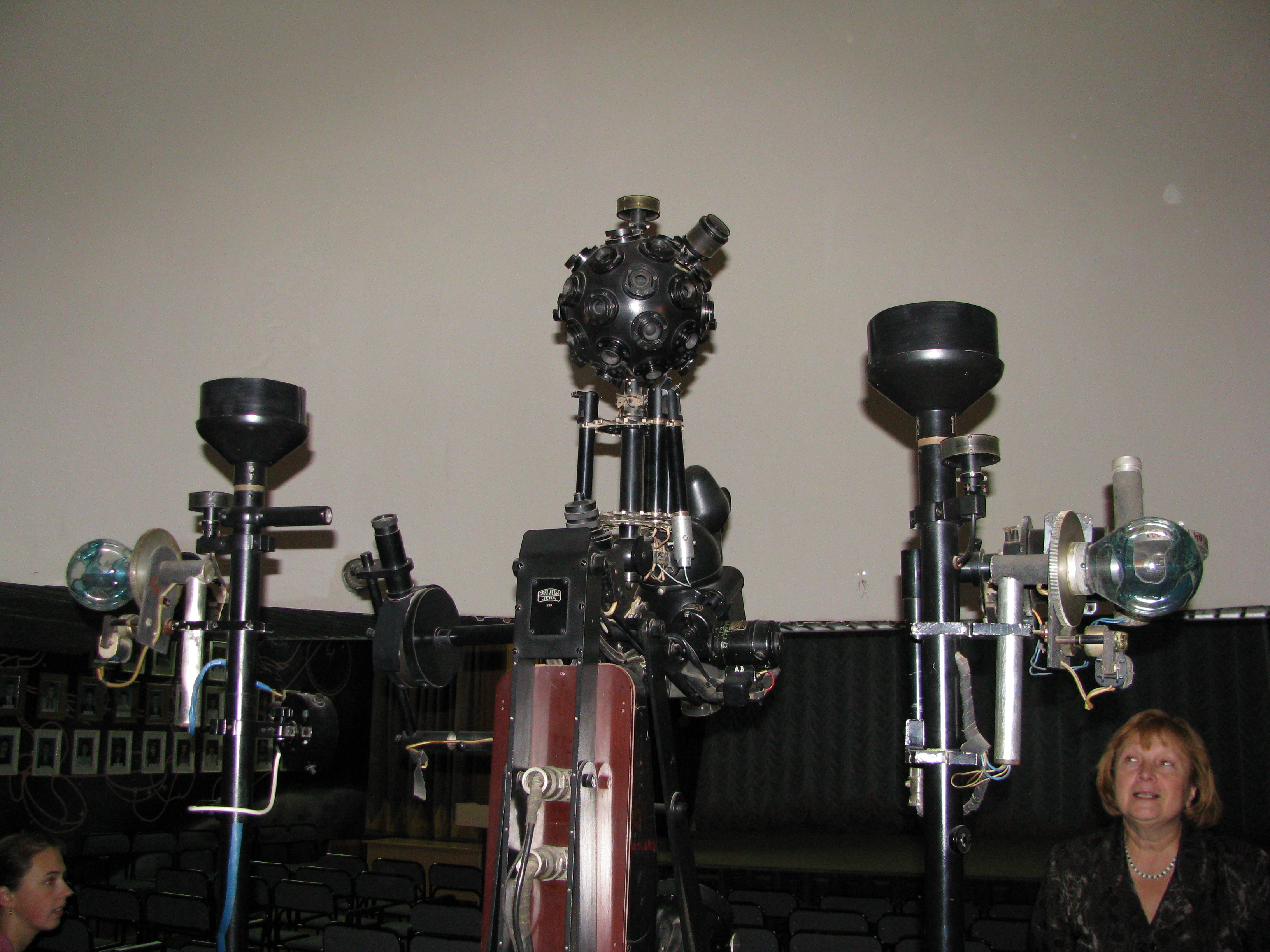 Аппарат Кировского Планетария